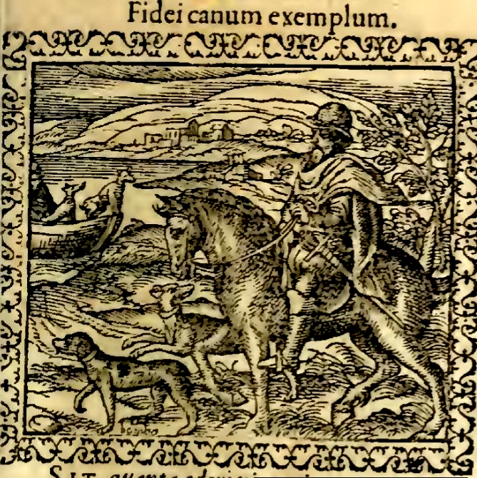 Zsámboki János és két kutyája, Bombo és Madel. Emblemata című művének első kiadásából (1564): a 126. embléma